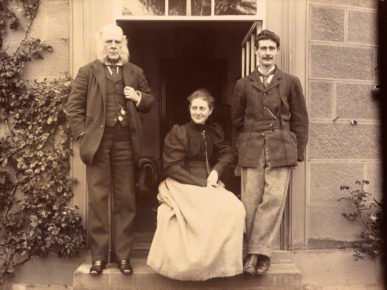 Albumen print 107 mm x 152 mm